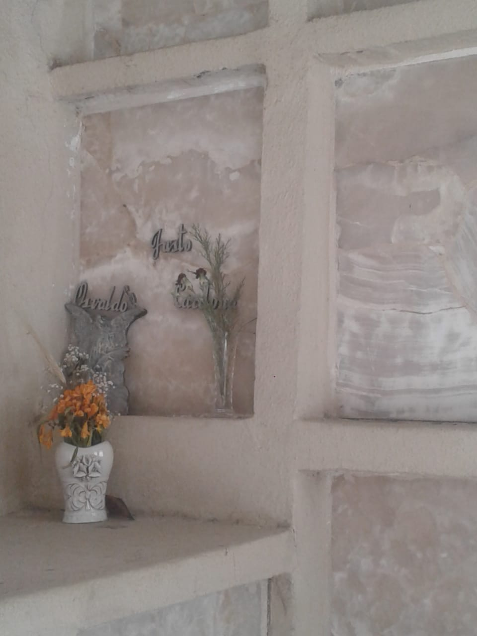 dentro del mausoleo